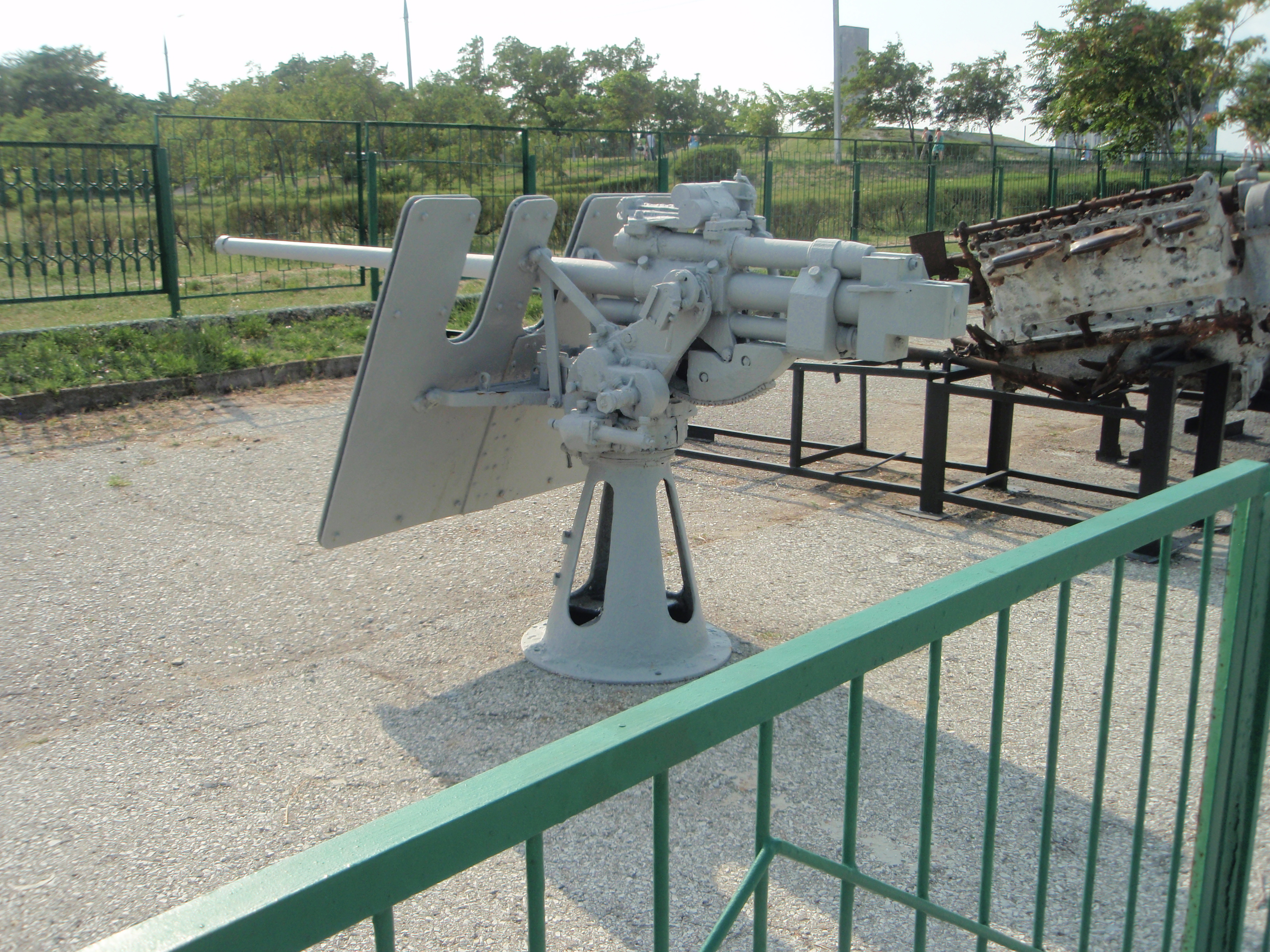 Советская 45-мм корабельная пушка 21-КМ в музее-заповеднике «Малая земля» (г.Новороссийск)